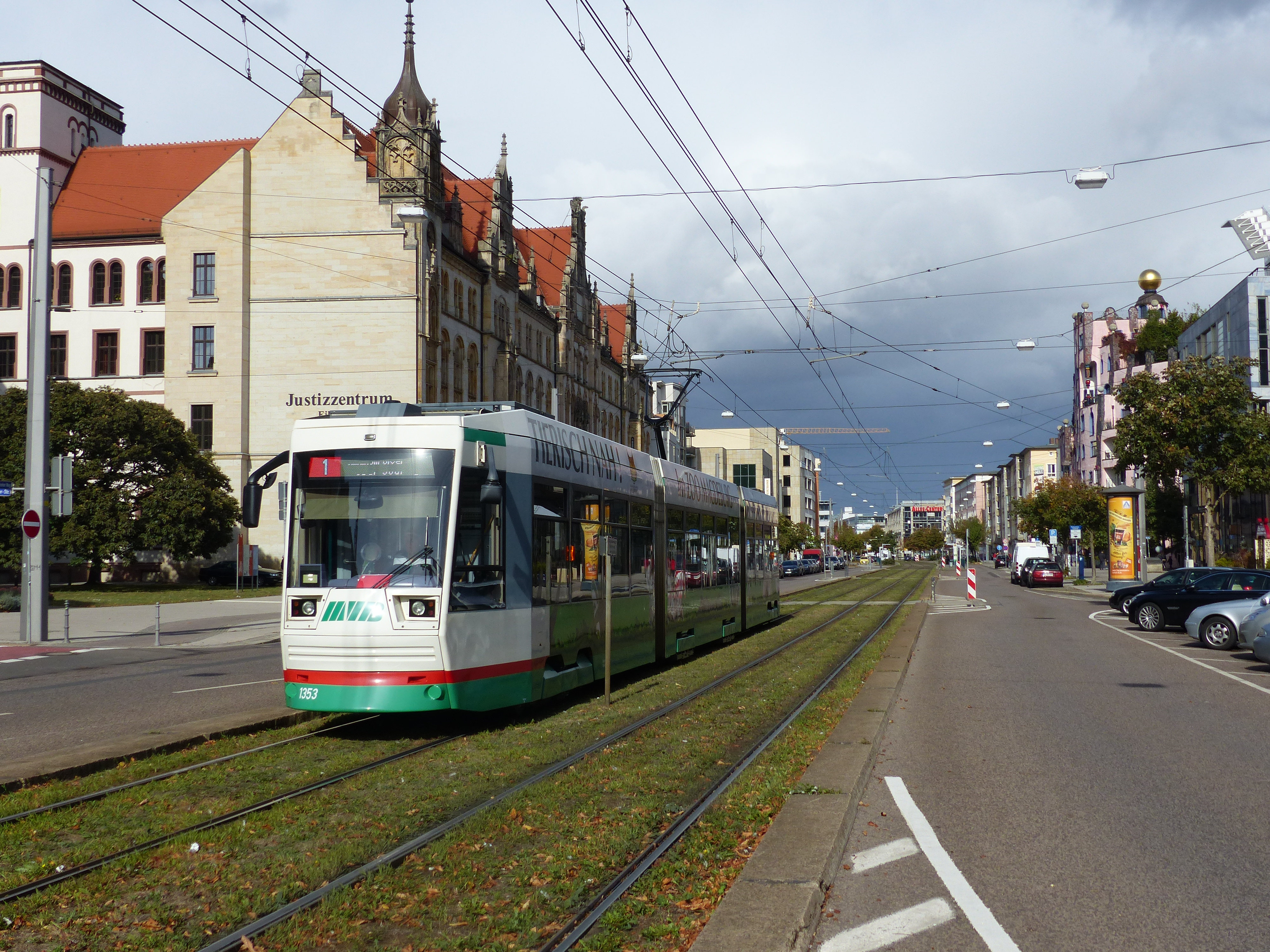 Magdeburg, Breiter Weg: Straßenbahn vor dem Justizzentrum